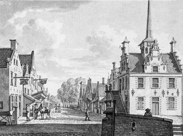 Het rechthuis van Balk, waterverftekening door Jan Bulthuis